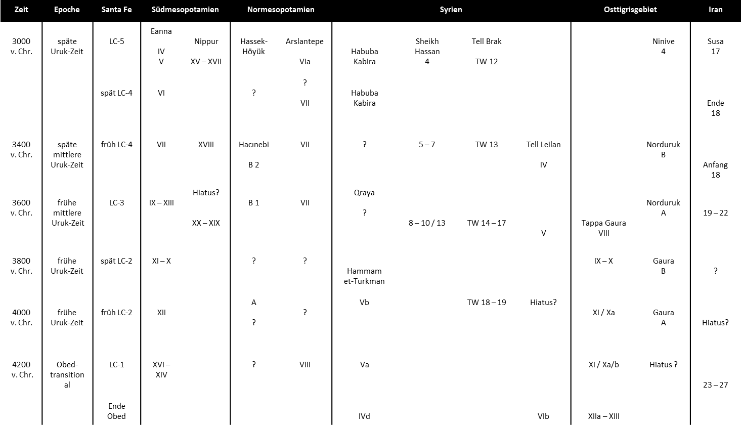 Chronologietabelle zur Uruk-Zeit in Anlehnung an Rothmann (Hrsg): Uruk Mesopotamia and its neighbours. Santa Fe 2001, S. 7.